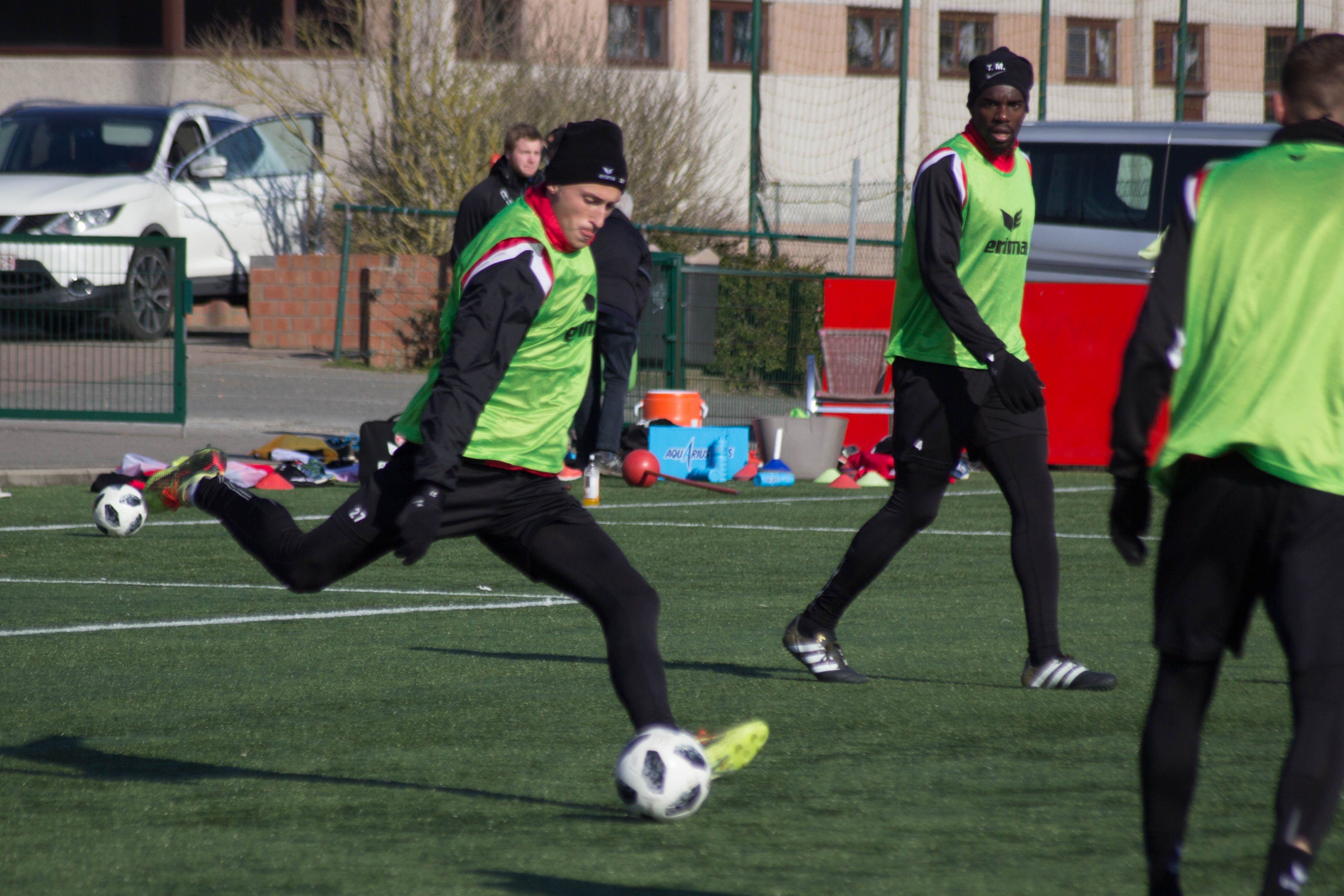 Entrainement du Royal Excel Mouscron, Futurosport, Mouscron. Le 22 Février 2018.